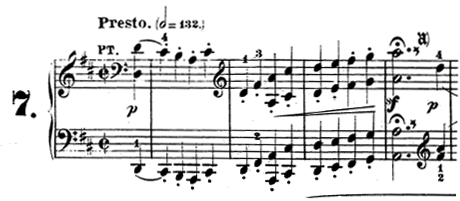 Compassos iniciais do primeiro movimento da Sonata para piano n.º 7, Op. 10 nº 3 de Ludwig van Beethoven